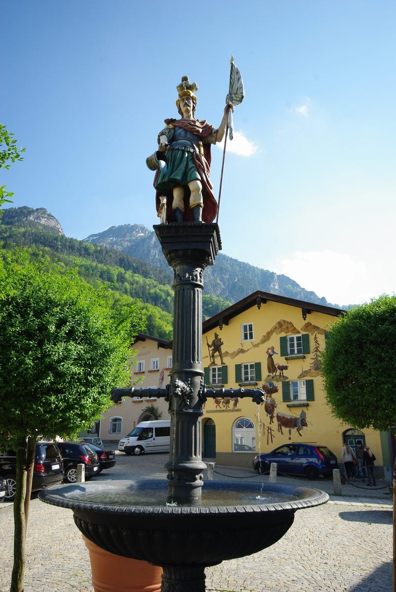 Florianibrunnen, Bad ReichenhallThis is a photograph of an architectural monument.